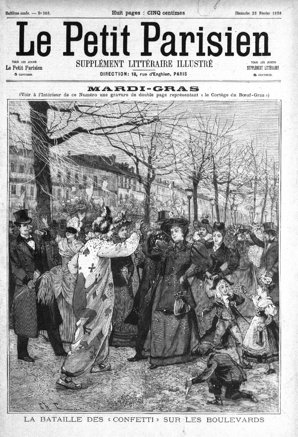 Titre : La Bataille des « Confetti » sur les boulevards Scène du Carnaval de Paris 1896